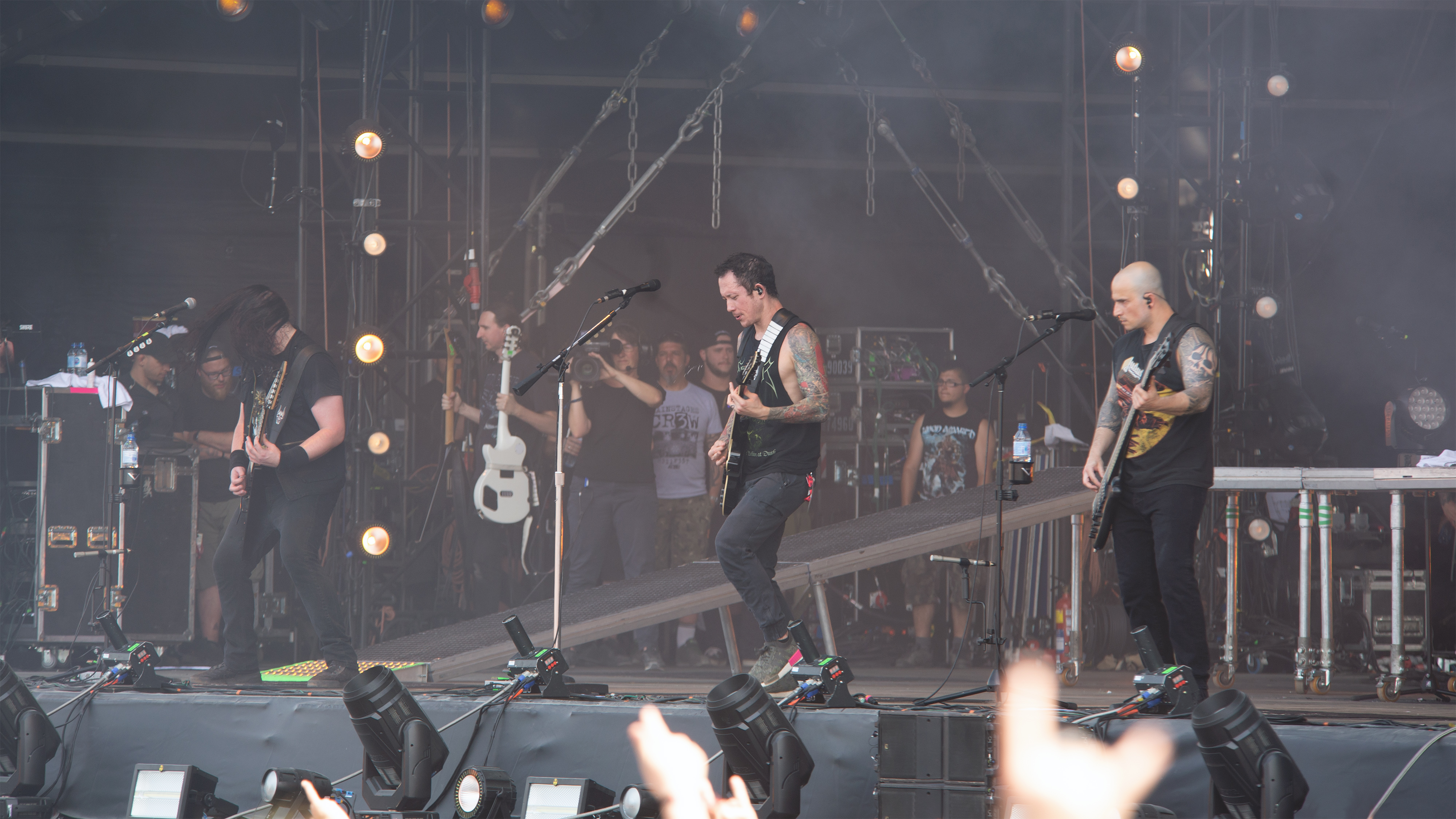 Concert du groupe américain Trivium au Hellfest 2019.